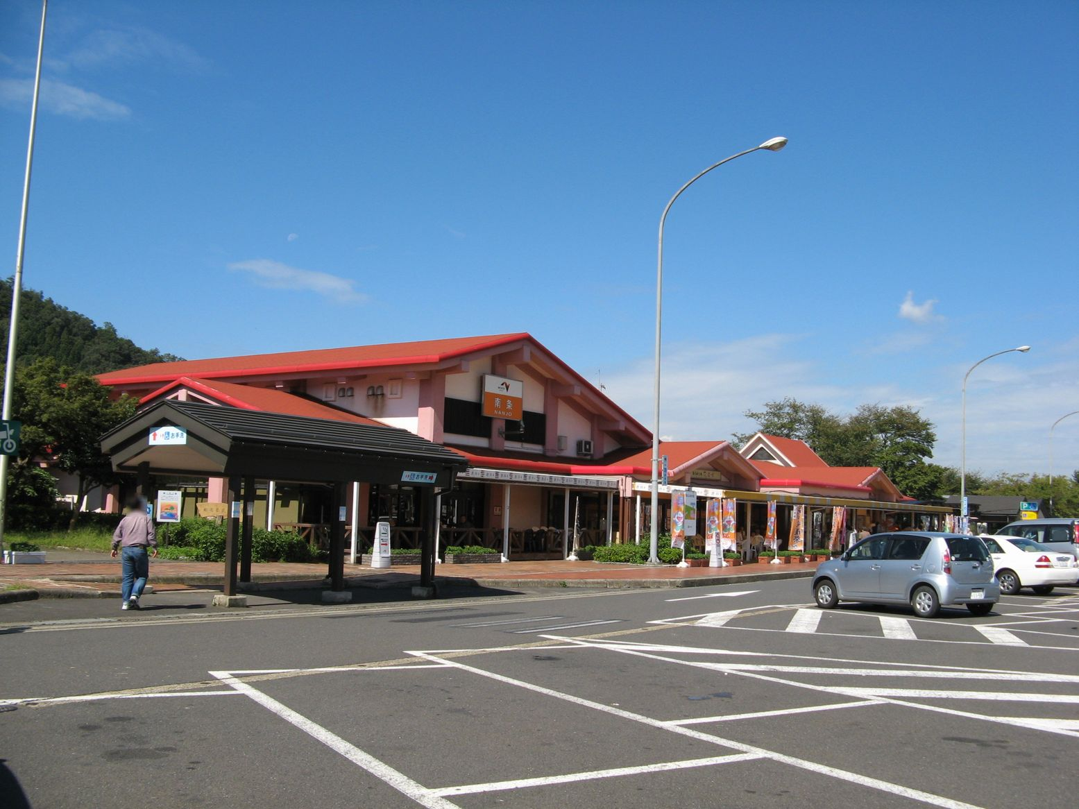 南条サービスエリア